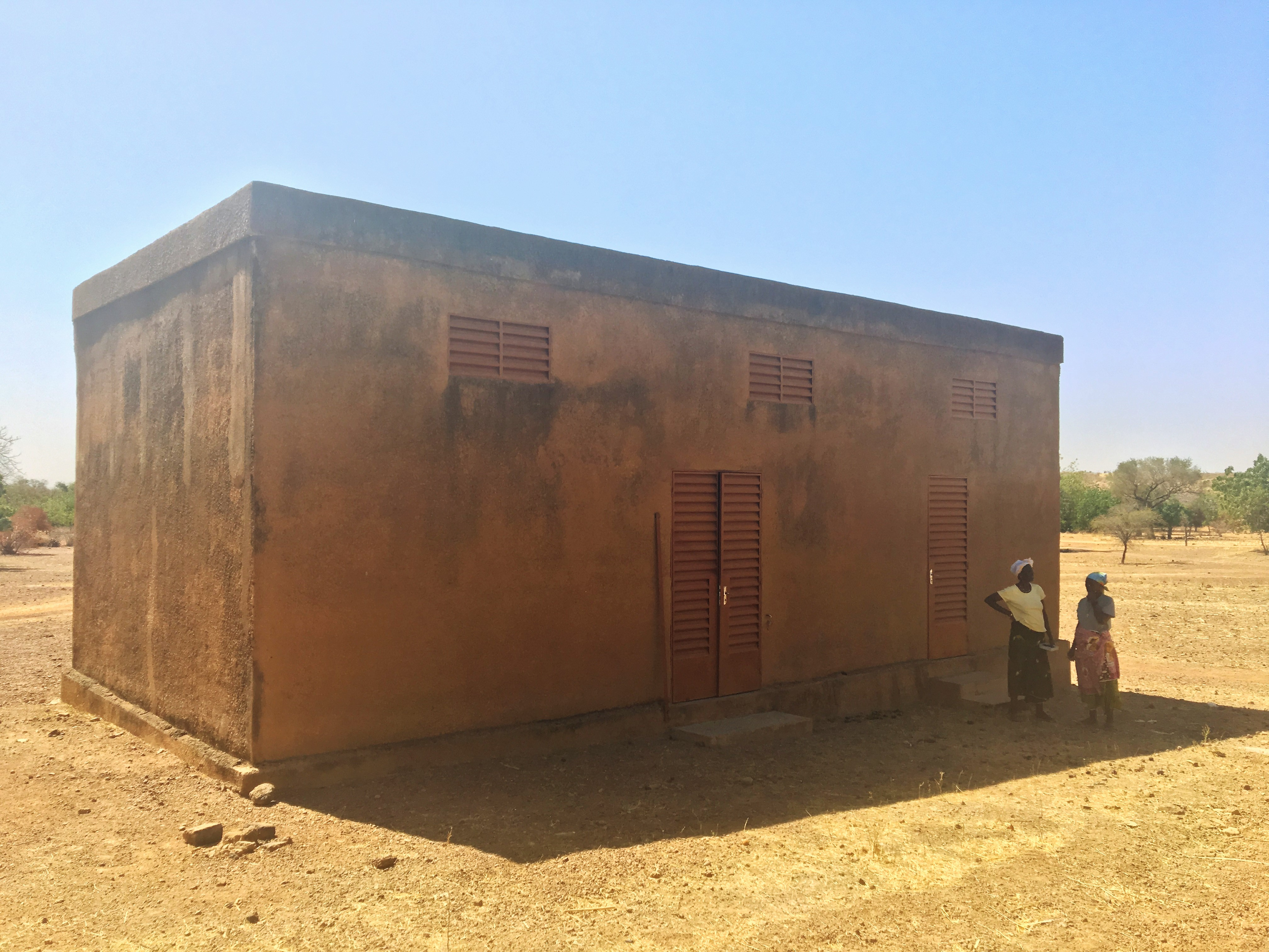 Banque de céréales de Ouazellé, construit en 1983, réhabilité par ASDM en 2008 et 2012